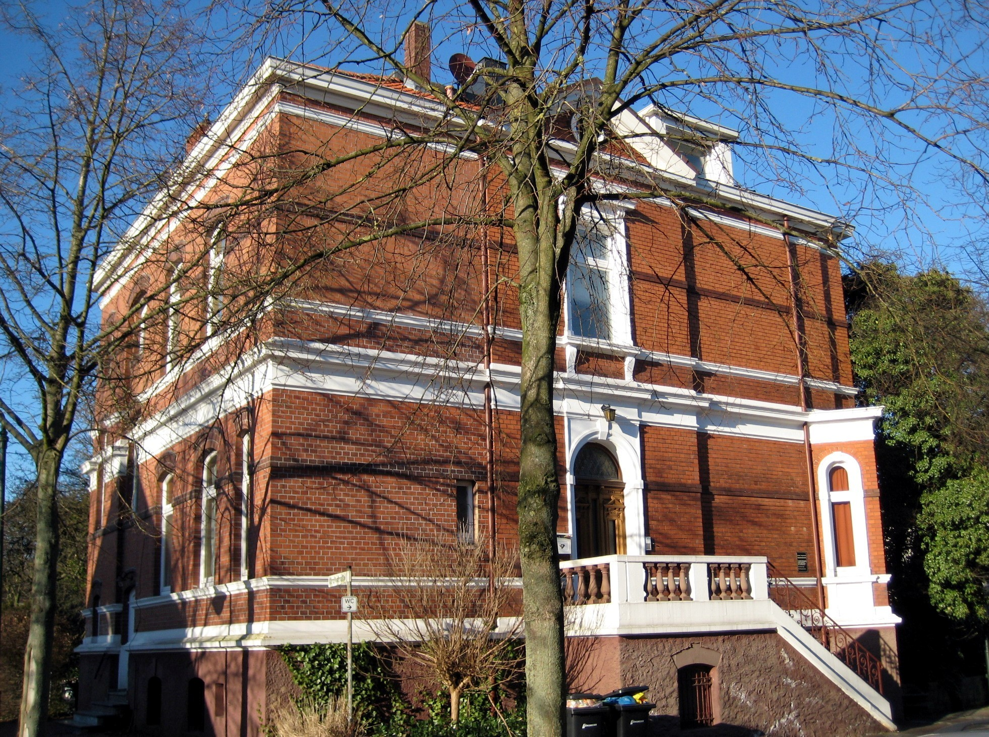 Jugendmusikschule EngerThis is a photograph of an architectural monument.